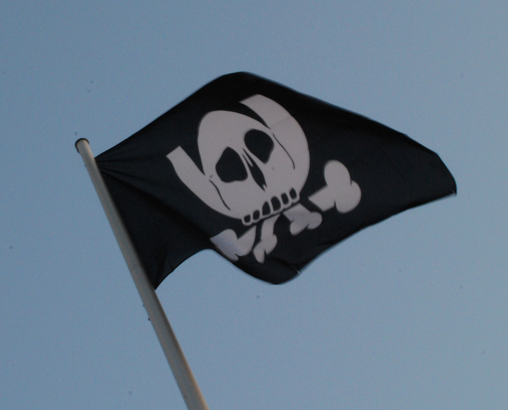 25C3, Chaos Communication Congress im BCC, Berlin, Deutschland – Pesthörnchen-Flagge.